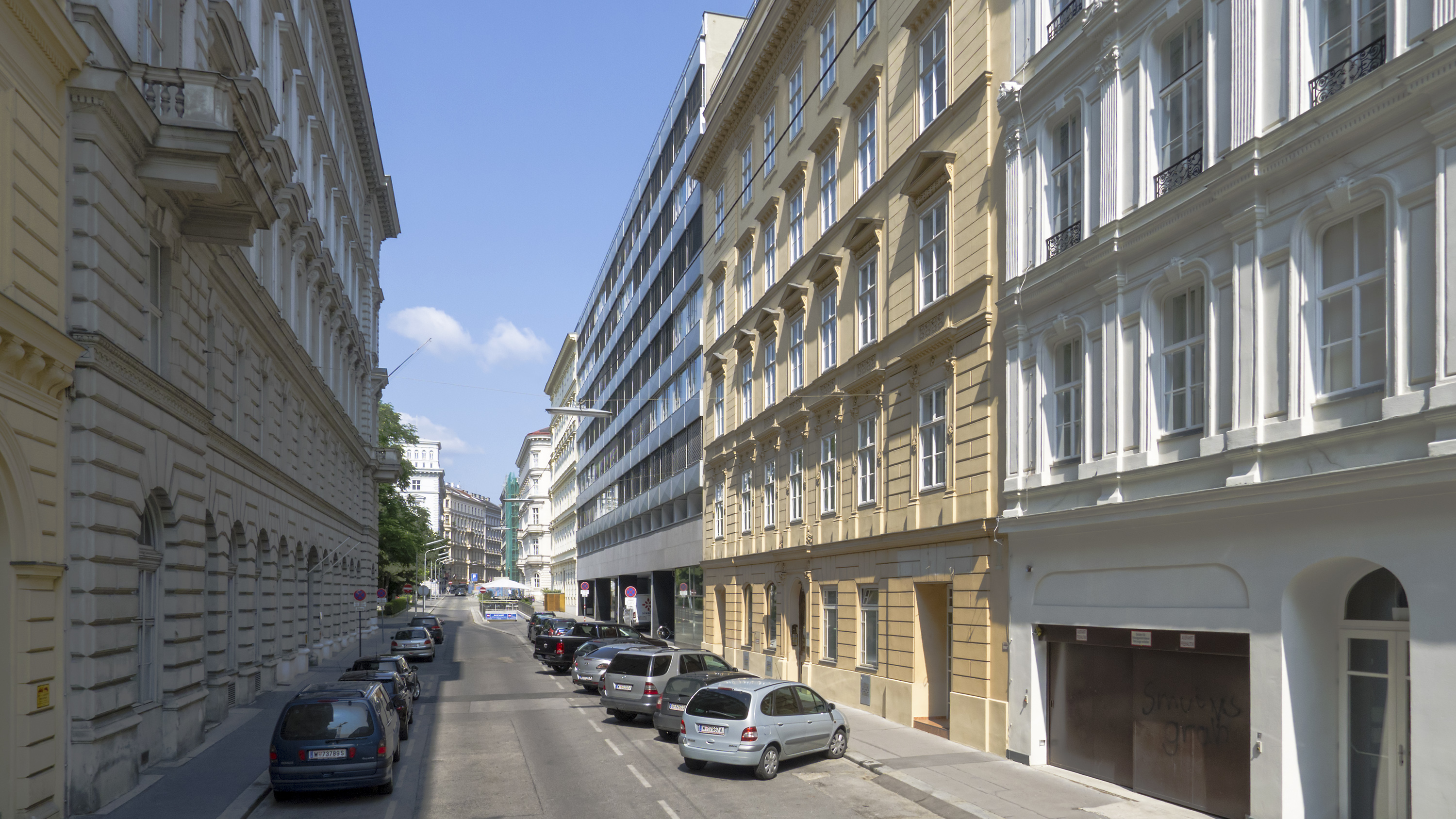 Elisabethstraße in Wien 1 bei Nr. 7 Richtung Nordwesten